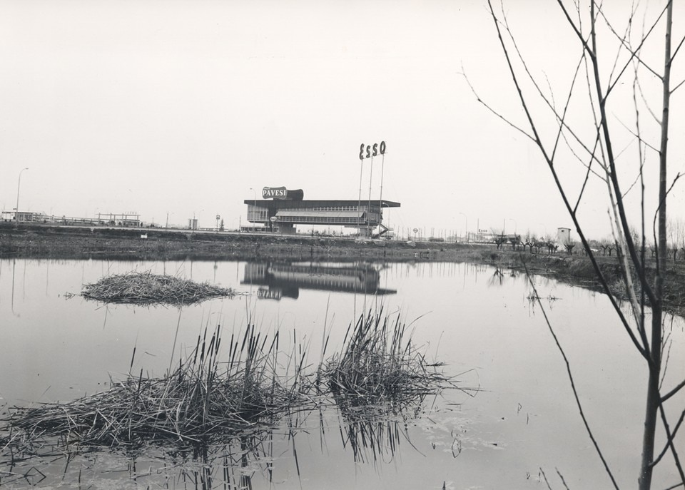 Autogrill di Montepulciano (1968)